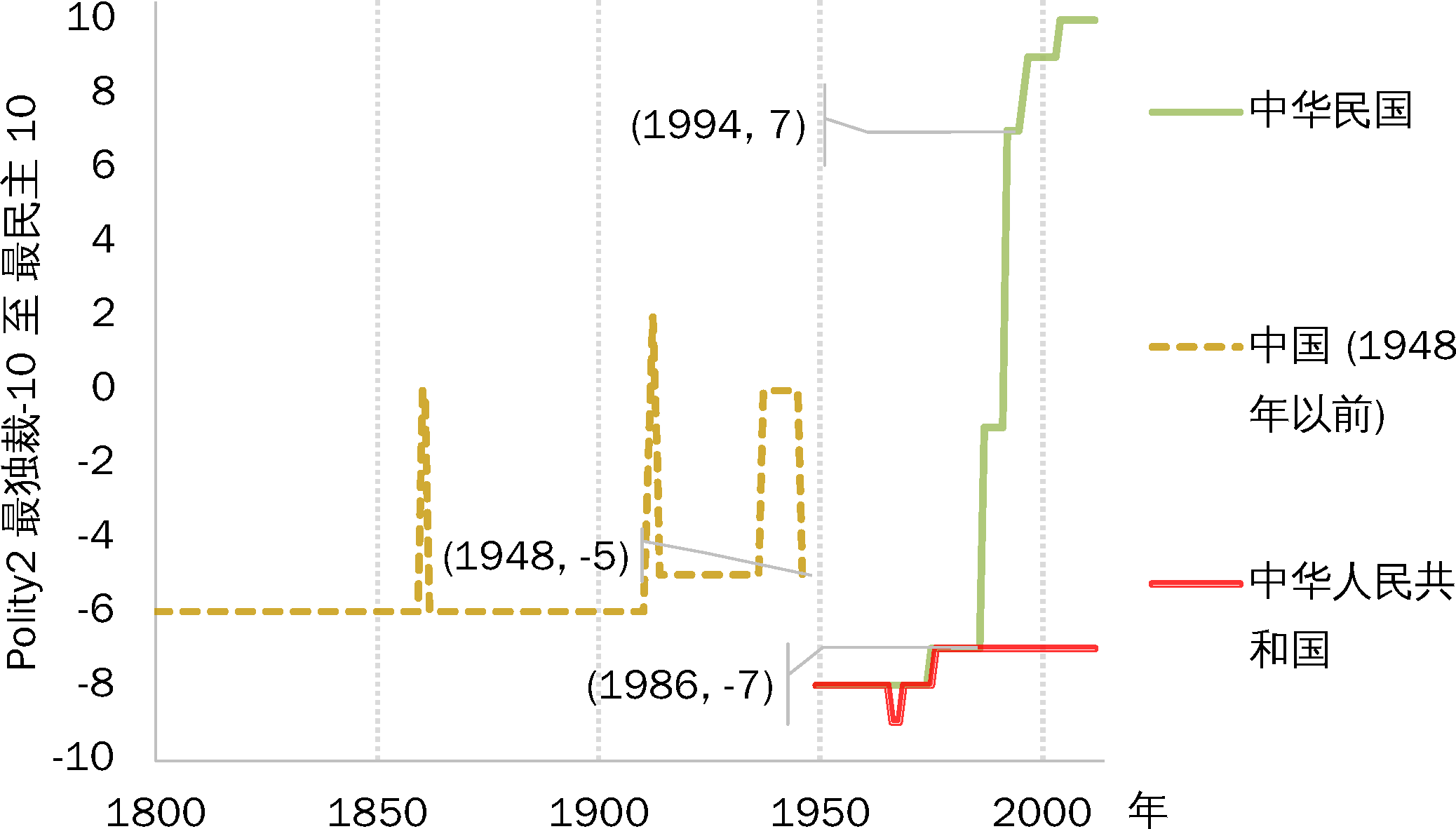 中國政體分類歷史變化，根據zh:政體資料集en:Polity data series